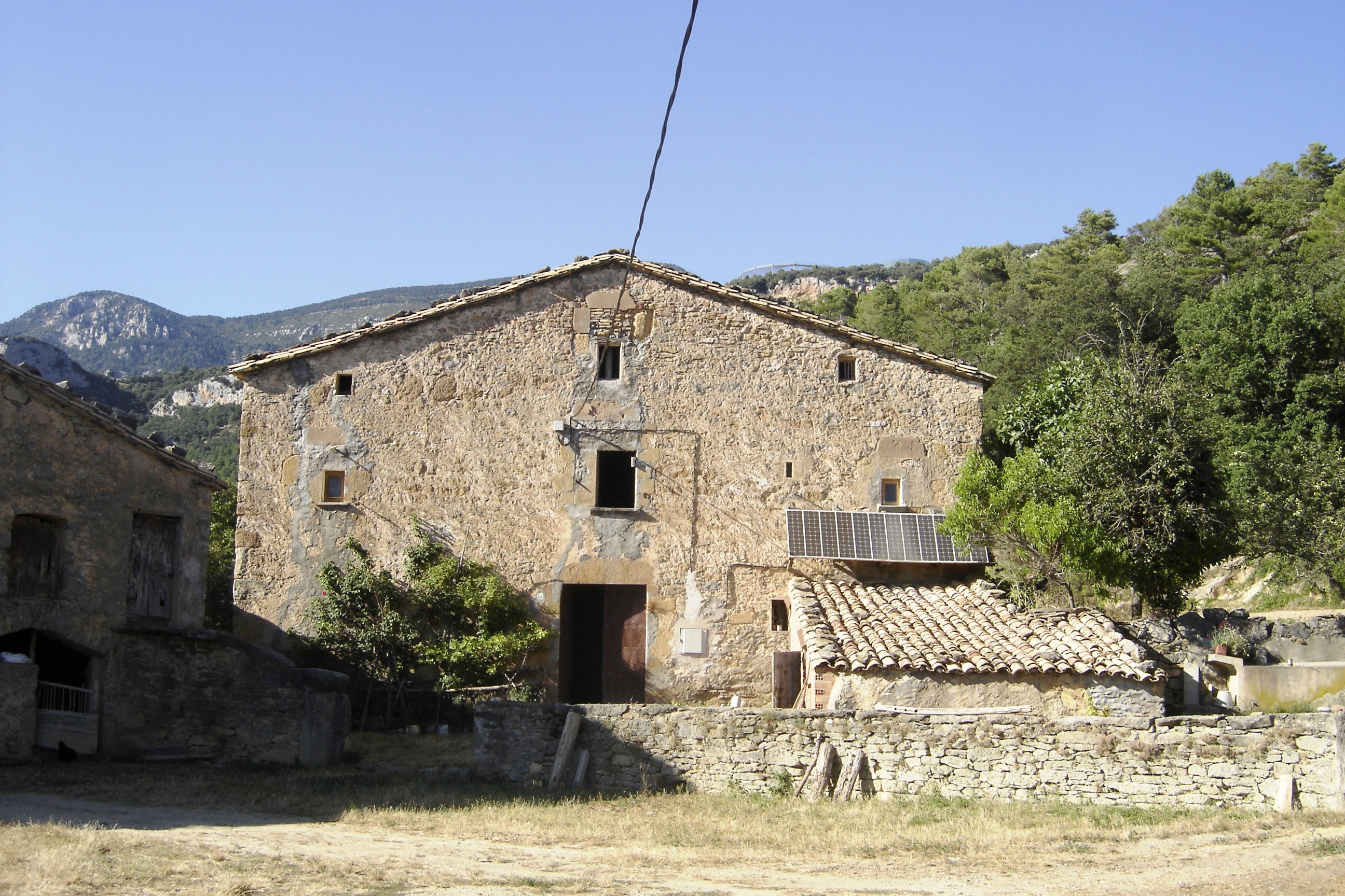 La masia de Junyent (Odèn) (Solsonès)